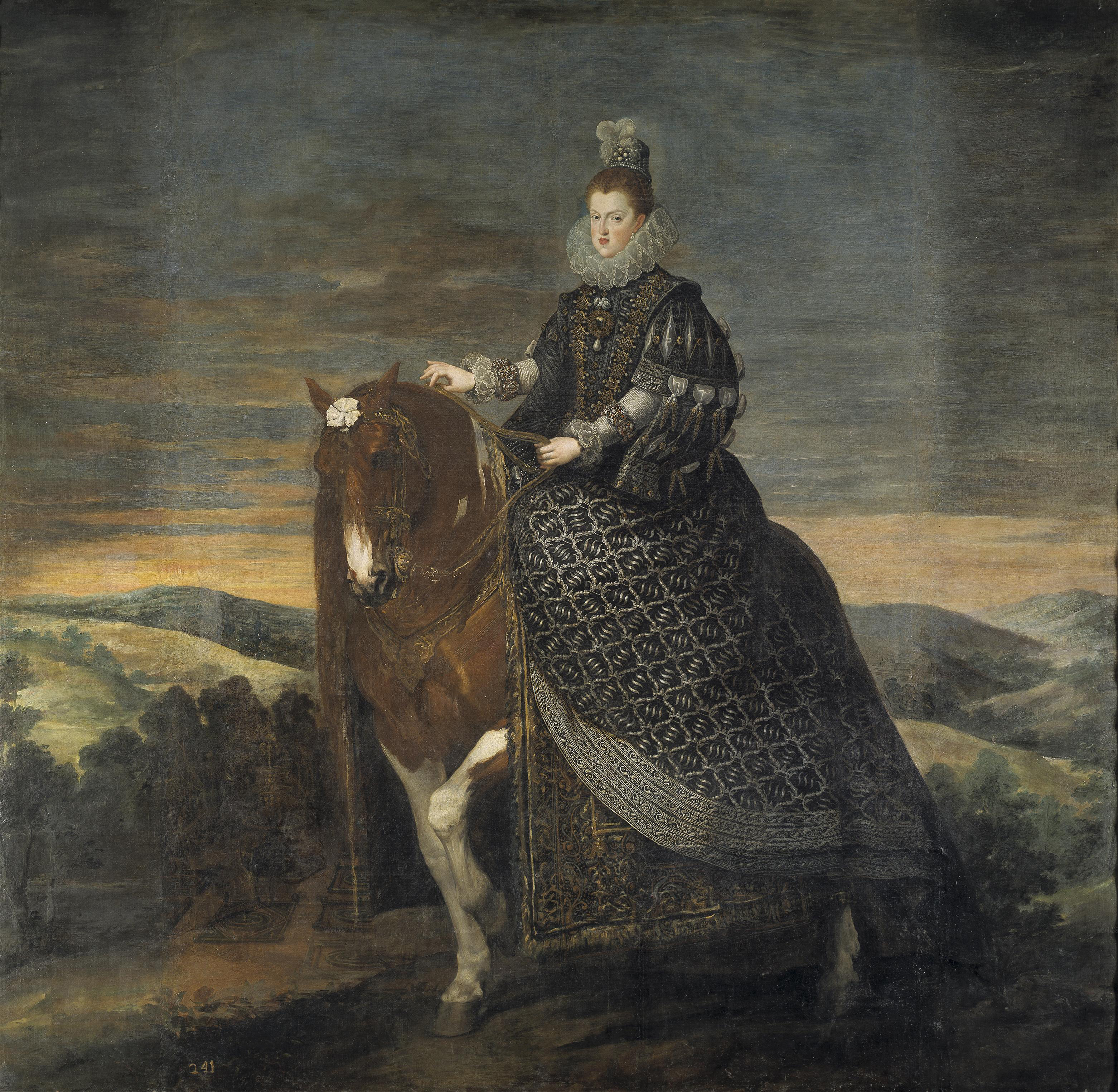 Retrato de la reina Margartita de Austria (1584-1611), que fue reina consorte de España por su matrimonio con el rey Felipe III de España y también la madre del rey Felipe IV.